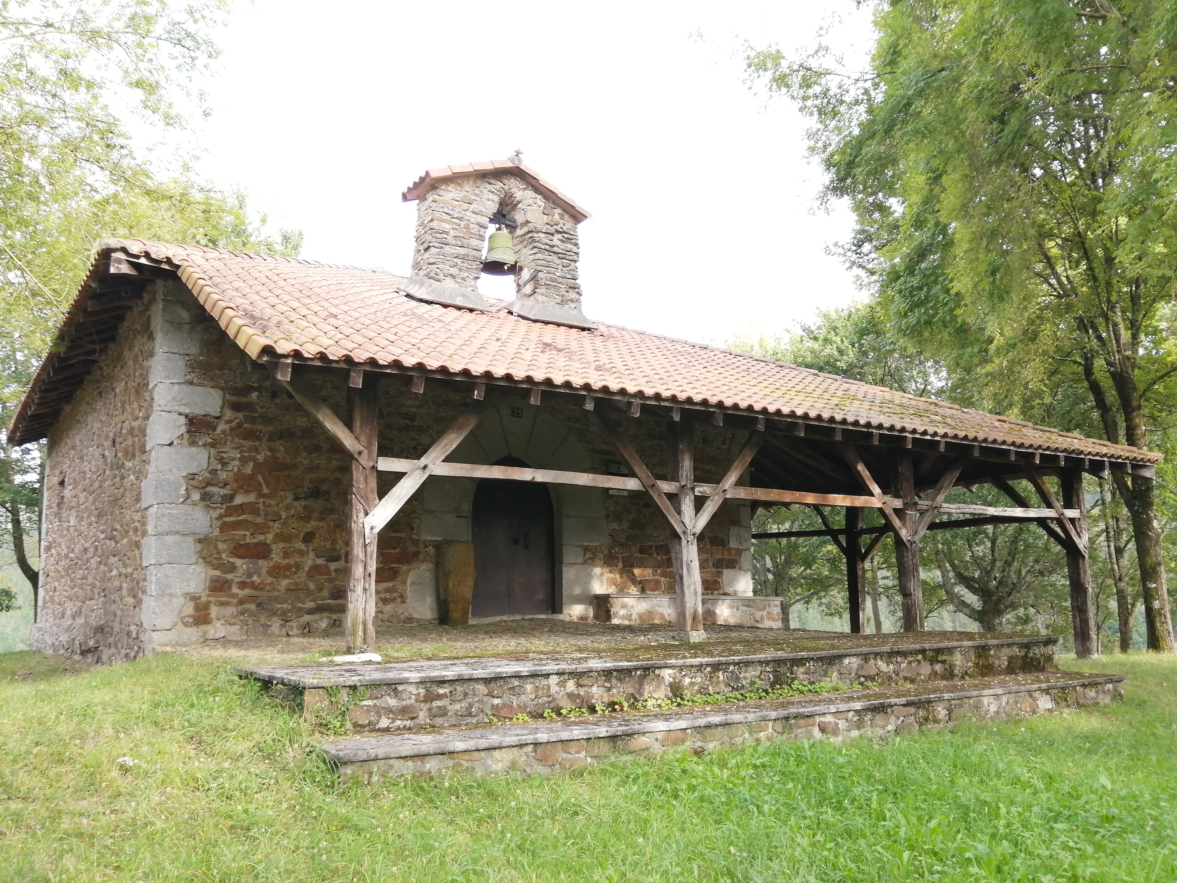 San Juan baseliza, Amallo, Markina-Xemein